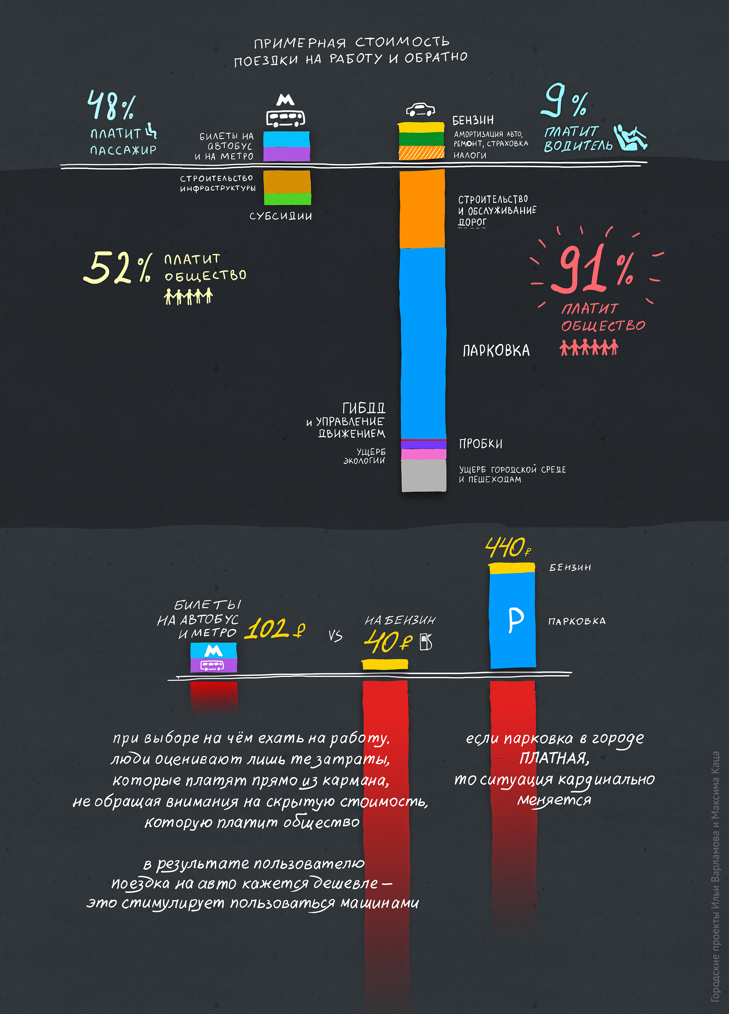 «Примерная стоимость поездки на работу и обратно» — иллюстрация для «Городских проектов» Ильи Варламова и Максима Каца. Настоящим я, Евгений Решетнёв, заявляю, что являюсь законным владельцем этого изображения: Я доверяю загрузку на сервер wikimedia и проведение лицензирования этого изображения участнику kf8. Я согласен опубликовать данное изображение, на условиях свободной лицензии cc-by-3.0 или любой более новой, опубликованной Фондом Свободного Программного Обеспечения (Free Software Foundation). Я понимаю, что тем самым даю право любому лицу распространять, изменять и использовать загруженные на сервер wikimedia материалы в любых законных целях (в том числе связанных с извлечением коммерческой выгоды) при условии соблюдения указанной лицензии. Я уведомлён, что я сохраняю исключительные авторские права на свои работы вне условий указанной лицензии, и что я всегда сохраняю право на упоминание меня как автора в соответствии с выбранной лицензией. Модификации, которые сделают другие люди, не будут приписаны мне. Данное разрешение затрагивает только мои исключительные авторские права, и я оставляю за собой право предпринимать действия против использования моей работы с нарушением закона, в частности, для клеветы, унижения чести и достоинства, нарушения правил использования торговых марок, нарушения права на охрану изображения гражданина и т. д. Я понимаю, что я не могу отозвать данное разрешение, и что моя работа может размещаться в проектах Фонда Викимедиа в течение неограниченного времени, либо быть удалённой оттуда администрацией ресурса. 1.12.2012 Евгений Решетнёв Вы при желании можете связаться со мной на моём сайте